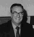 Retrato de Rosendo Huguet Peralta